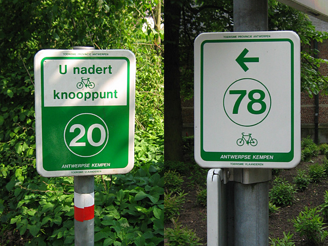 bordjes van fietsknooppuntennetwerk in de Antwerpse Kempen